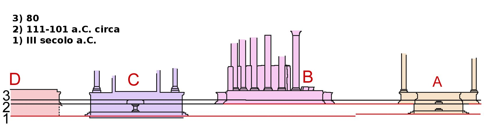 Alzato dell'area archeologica di largo di Torre Argentina a Roma.